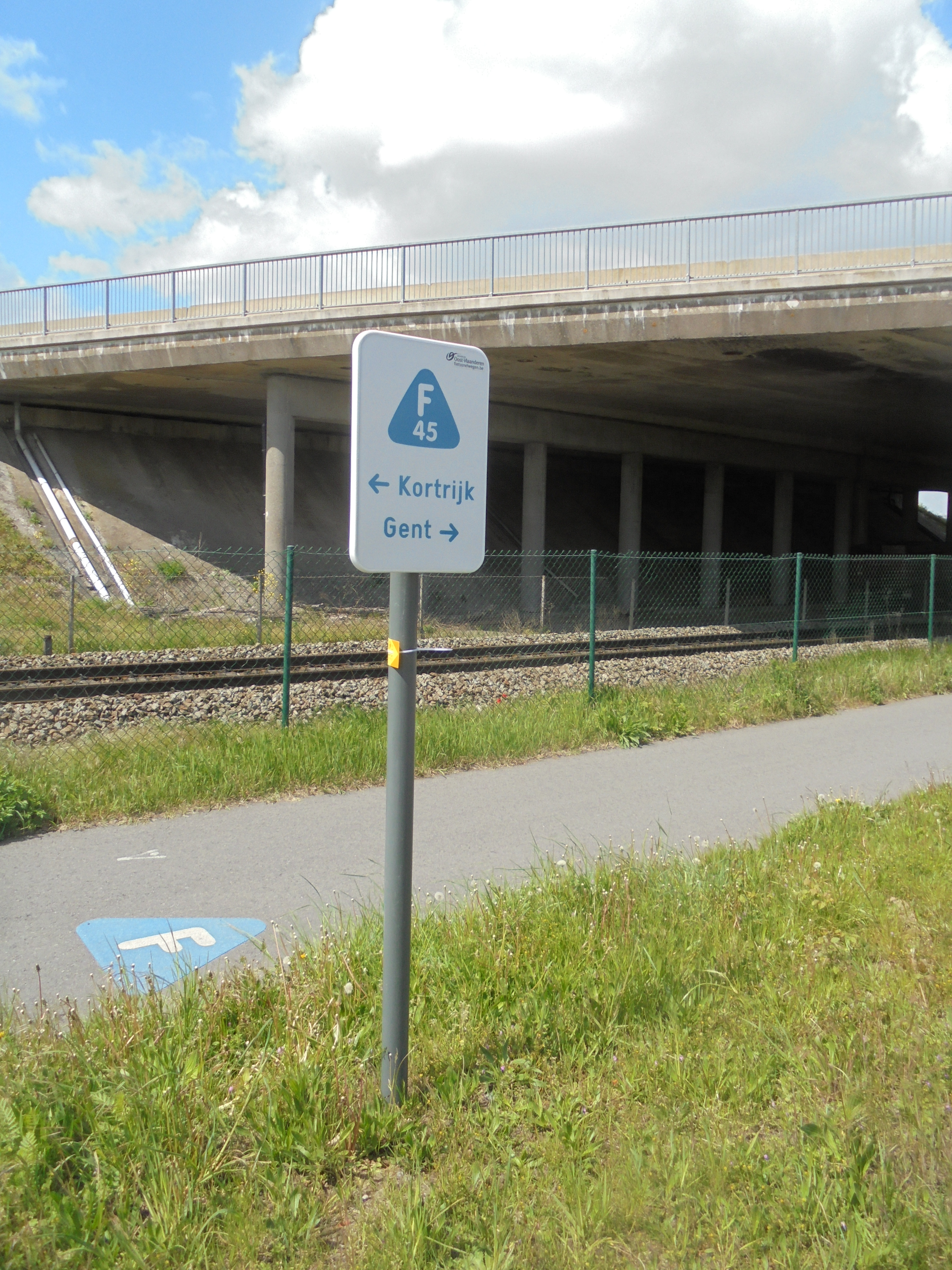 De Fietssnelweg F45 ter hoogte van de E17 - tussen Nazareth en De Pinte - langs de Spoorlijn 86 - Oost-Vlaanderen - België